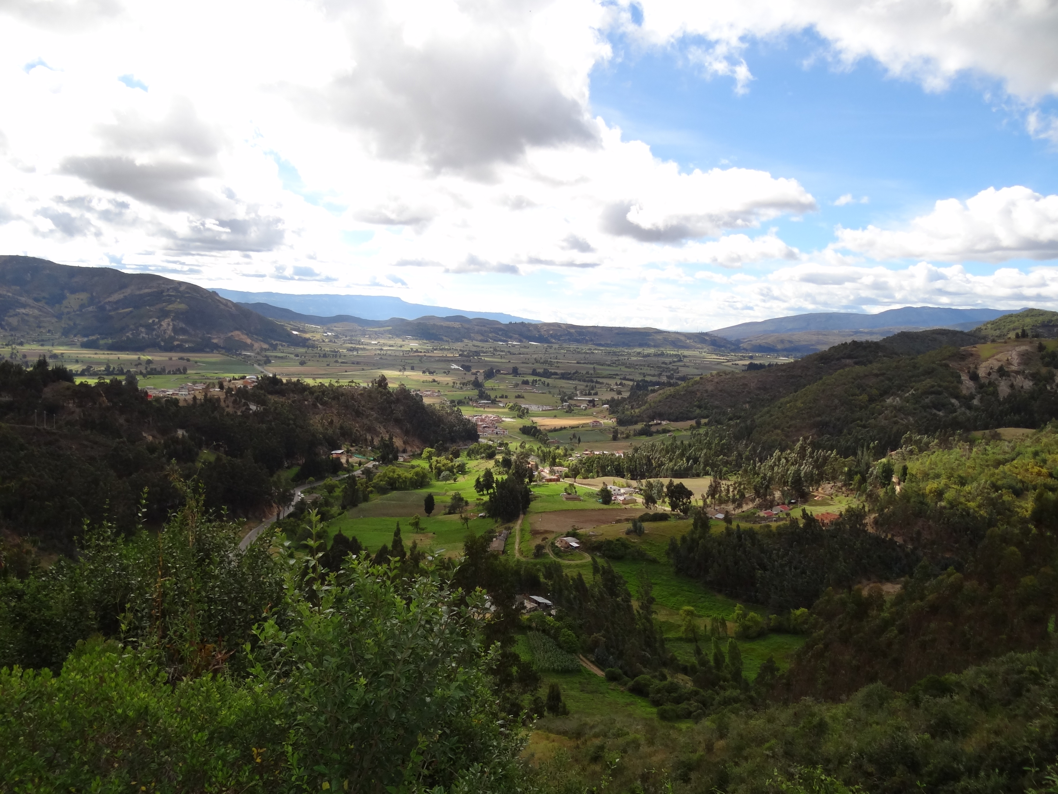 Panorámica del área rural del municipio de Samacá, departamento de Boyacá, Colombia